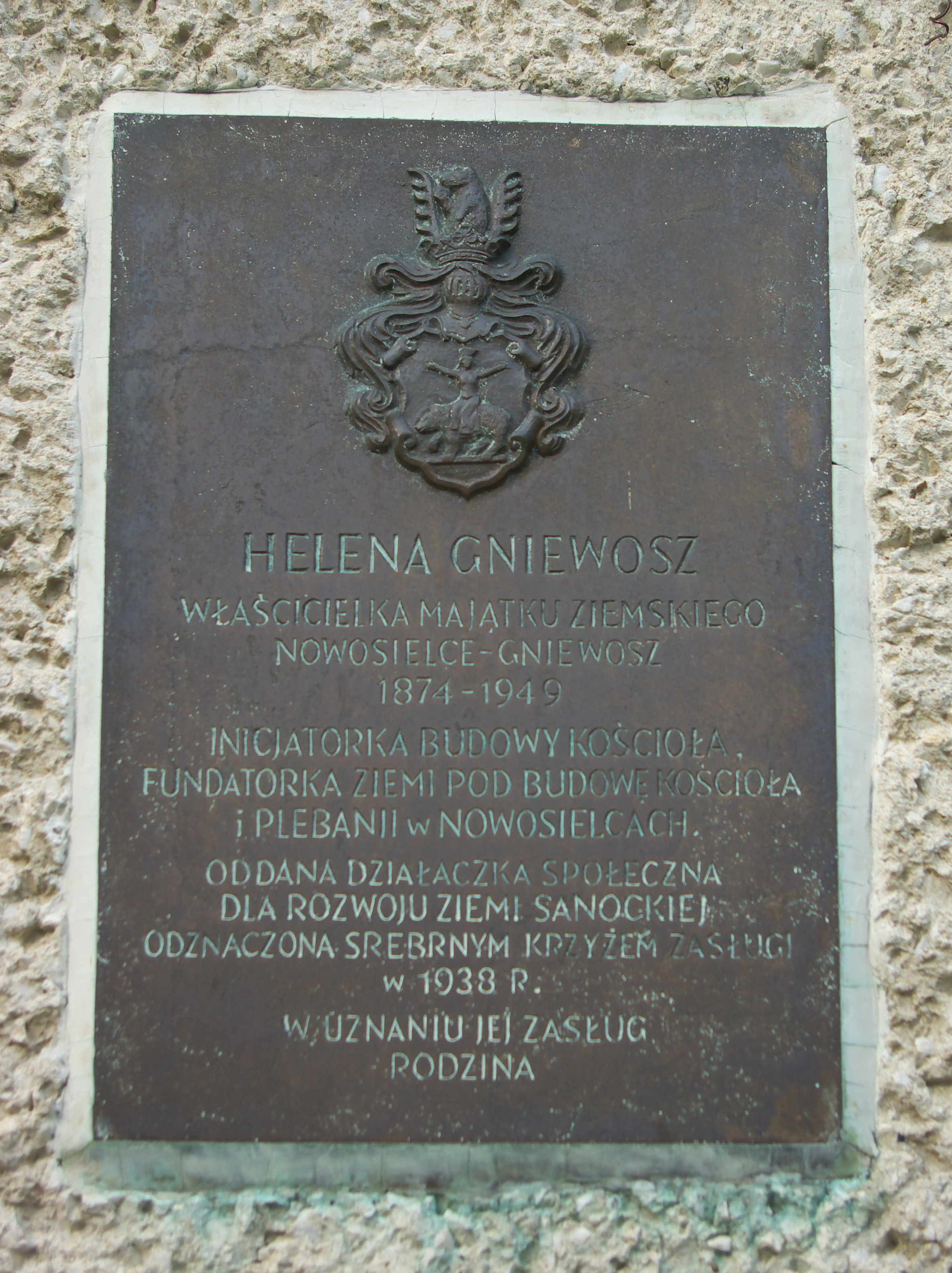 Kościół Matki Boskiej Nieustającej Pomocy w Nowosielcach (powiat sanocki) wybudowany w 1933. Tablica upamiętniająca Helenę Gniewosz